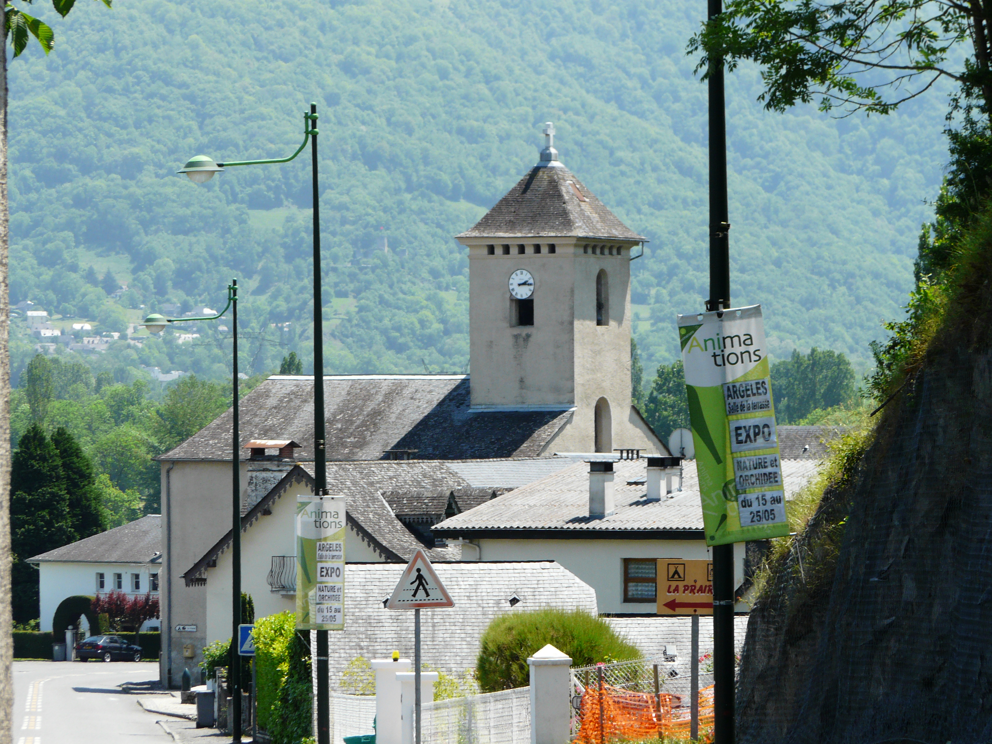 L'église Saint-Laurent de Lau, Lau-Balagnas, Hautes-Pyrénées, France.